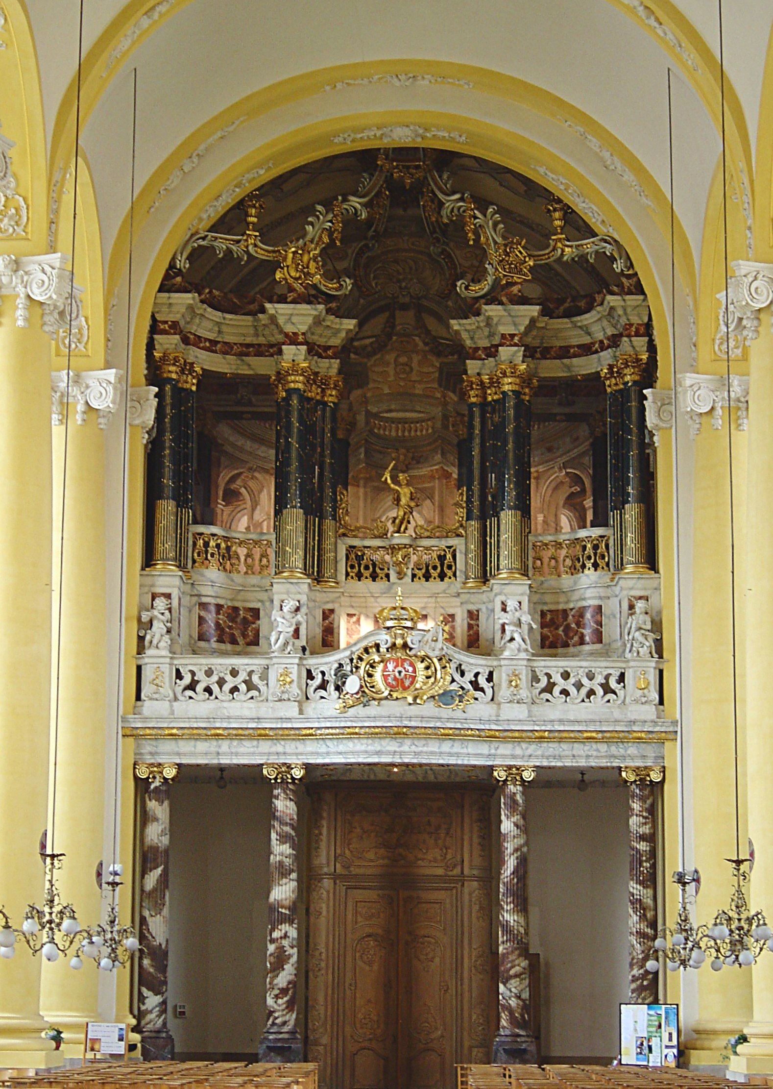 Lunéville (Meuthe-et-Moselle, France), église Saint-Jacques, seul buffet sans Montre du à Emmanuel Héré, peint par André Joly, pour l'orgue de Nicolas Dupont en 1751; reconstruit en 1852 par Jean-Nicolas III JEANPIERRE, restauration-reconstruction en 2003 par Bertrand Cattiaux et Laurent Plet.